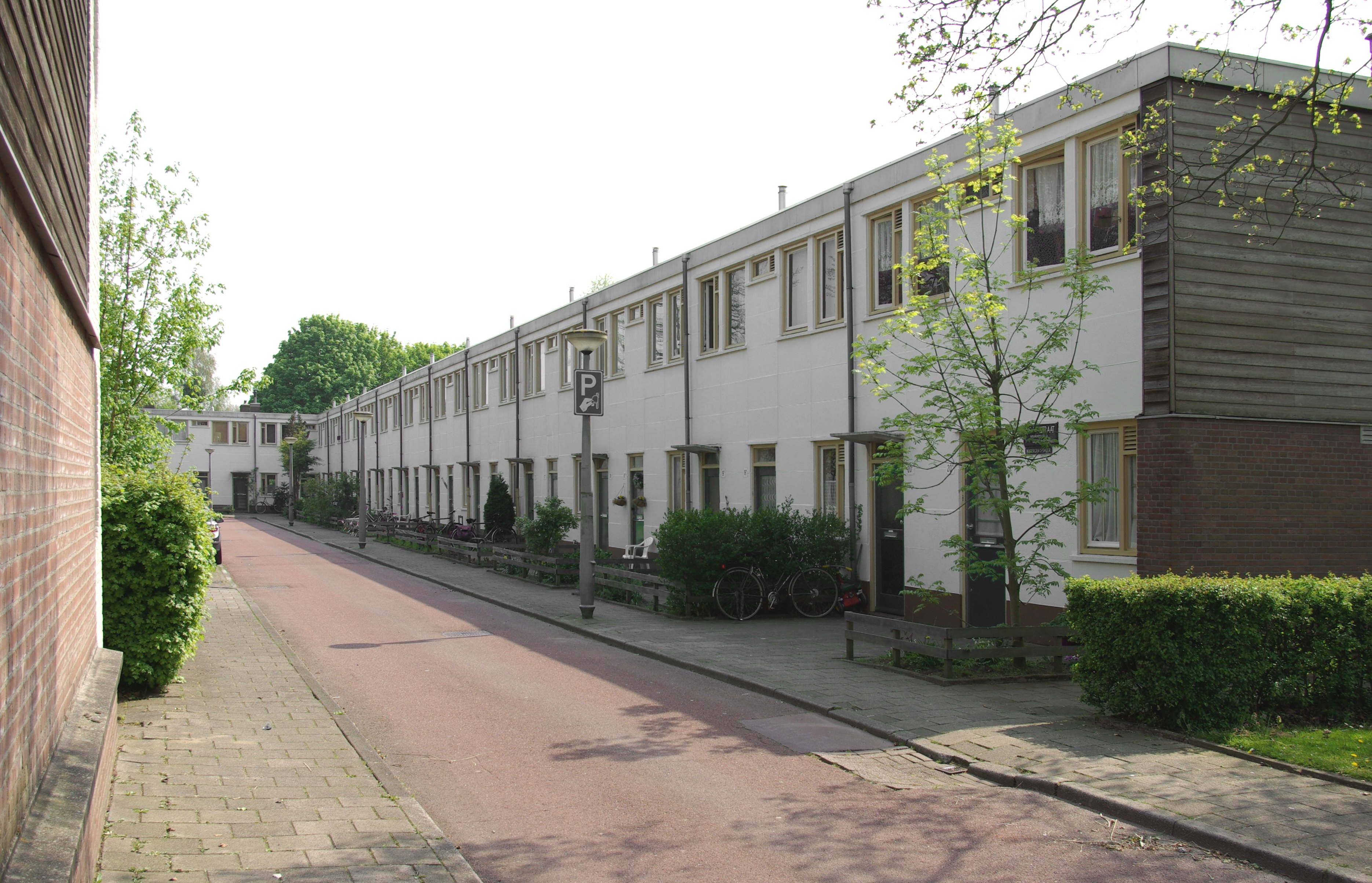 De wijk Jeruzalem in Amsterdam-Oost. De stedenbouwkundigen en architecten Cornelis van Eesteren, J.H. Mulder, B. Merkelbach, Ch.J.F. Karsten, Piet Elling en M. Stam zijn de ontwerpers. De woningen zijn gebouwd tussen 1950 en 1954. Na voordracht in 2007 via de lijst van rijksmonumenten uit de periode 1940-1958, opgesteld door Ronald Plasterk, werd de wijk Frankendaal/Jeruzalem erkend als rijksmonument.